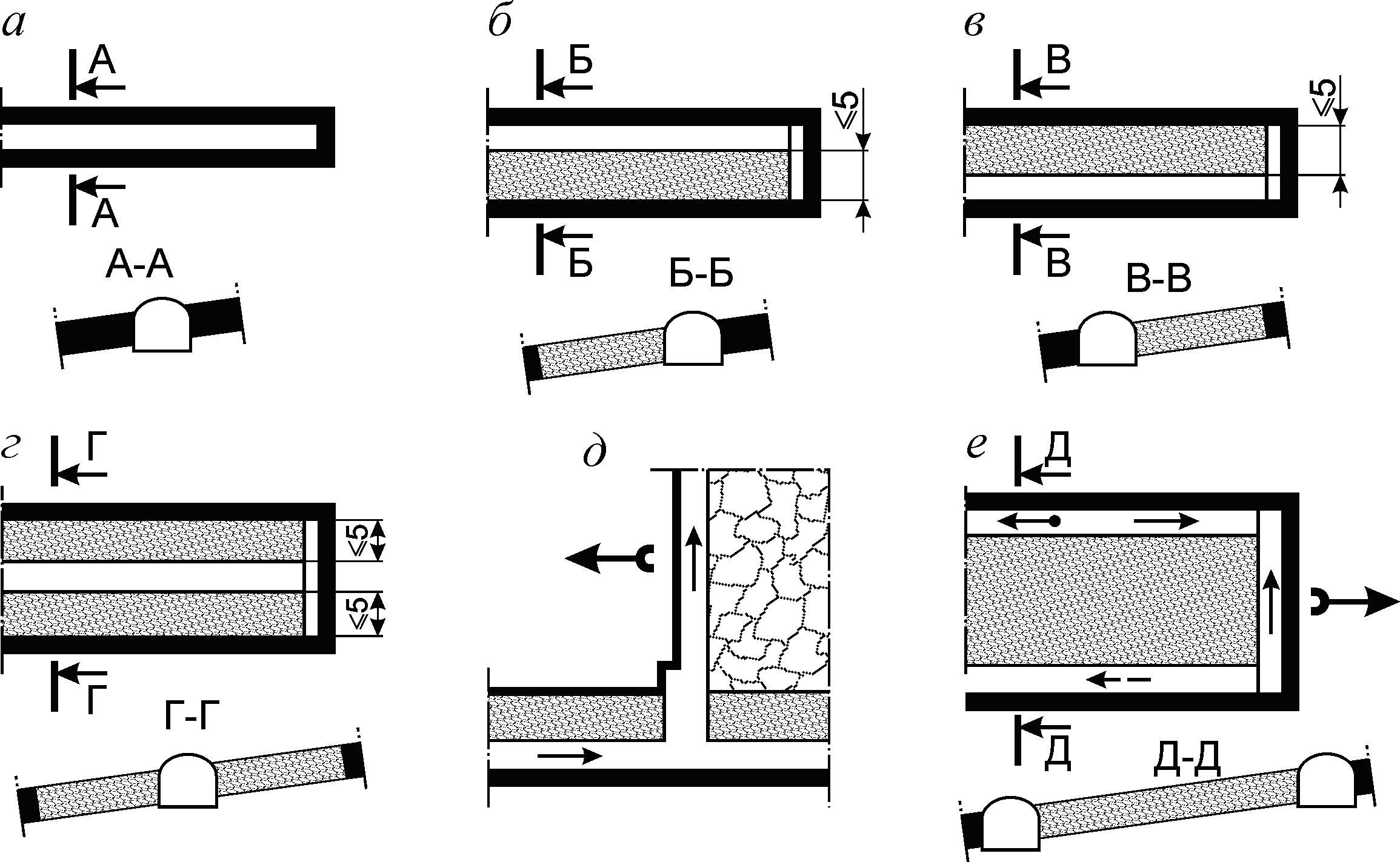 Штрек